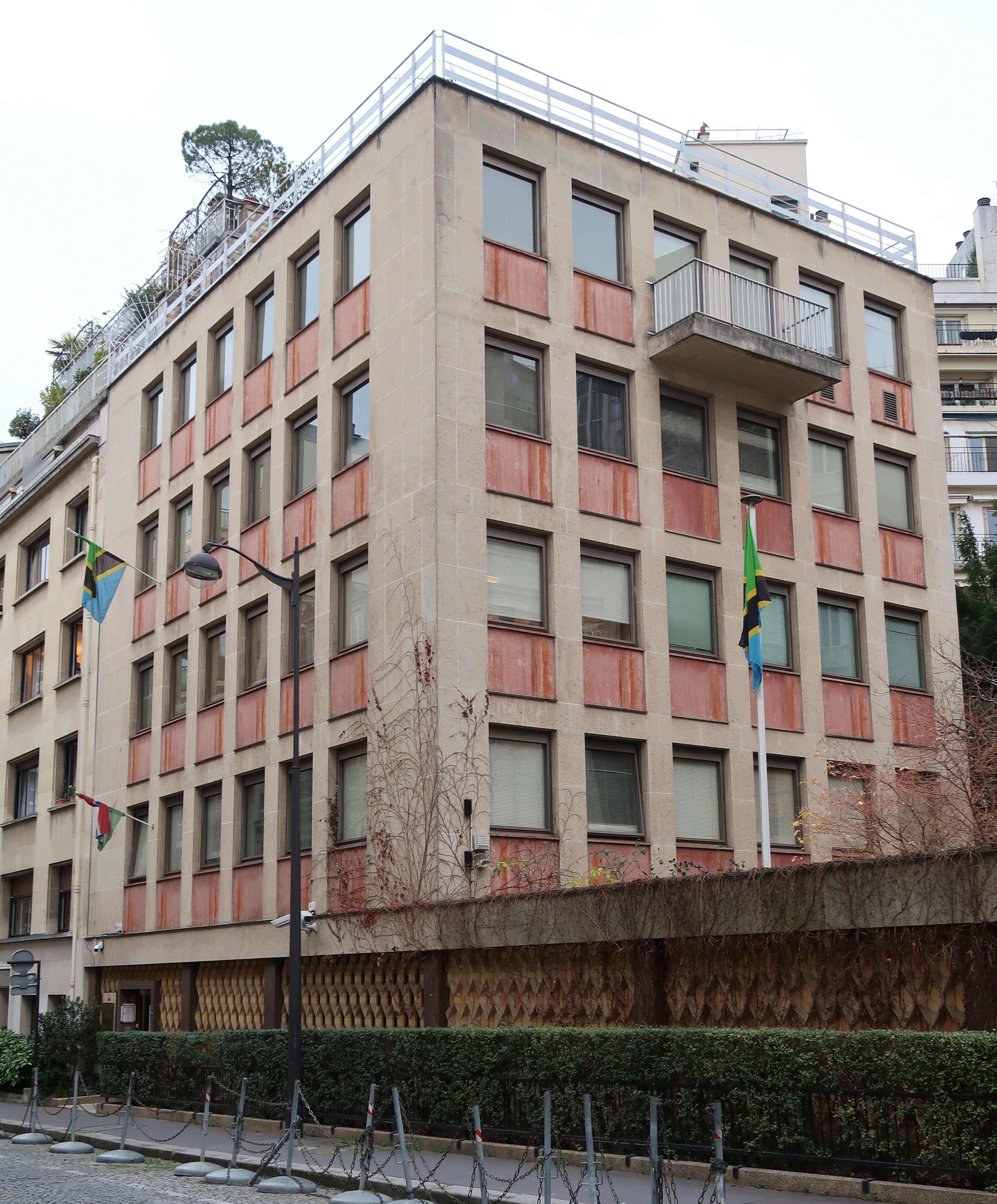 Ambassades de Gambie et de Tanzanie en France, 7 ter rue Léonard-de-Vinci (Paris, 16e).